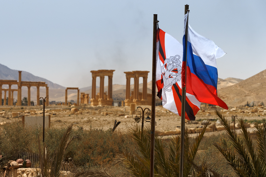 Работа зарубежных СМИ в Пальмире (Сирийская Арабская Республика). Флаг России и Инженерных войск России в Пальмире